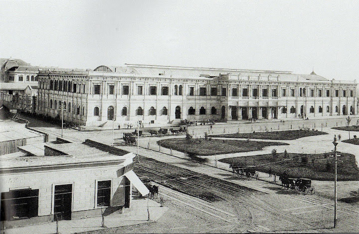 Estacion 19 de Noviembre del Ferrocarril del Oeste, en la nueva ciudad de La Plata. Desde 1928, transformada en el Pasaje Dardo Rocha.